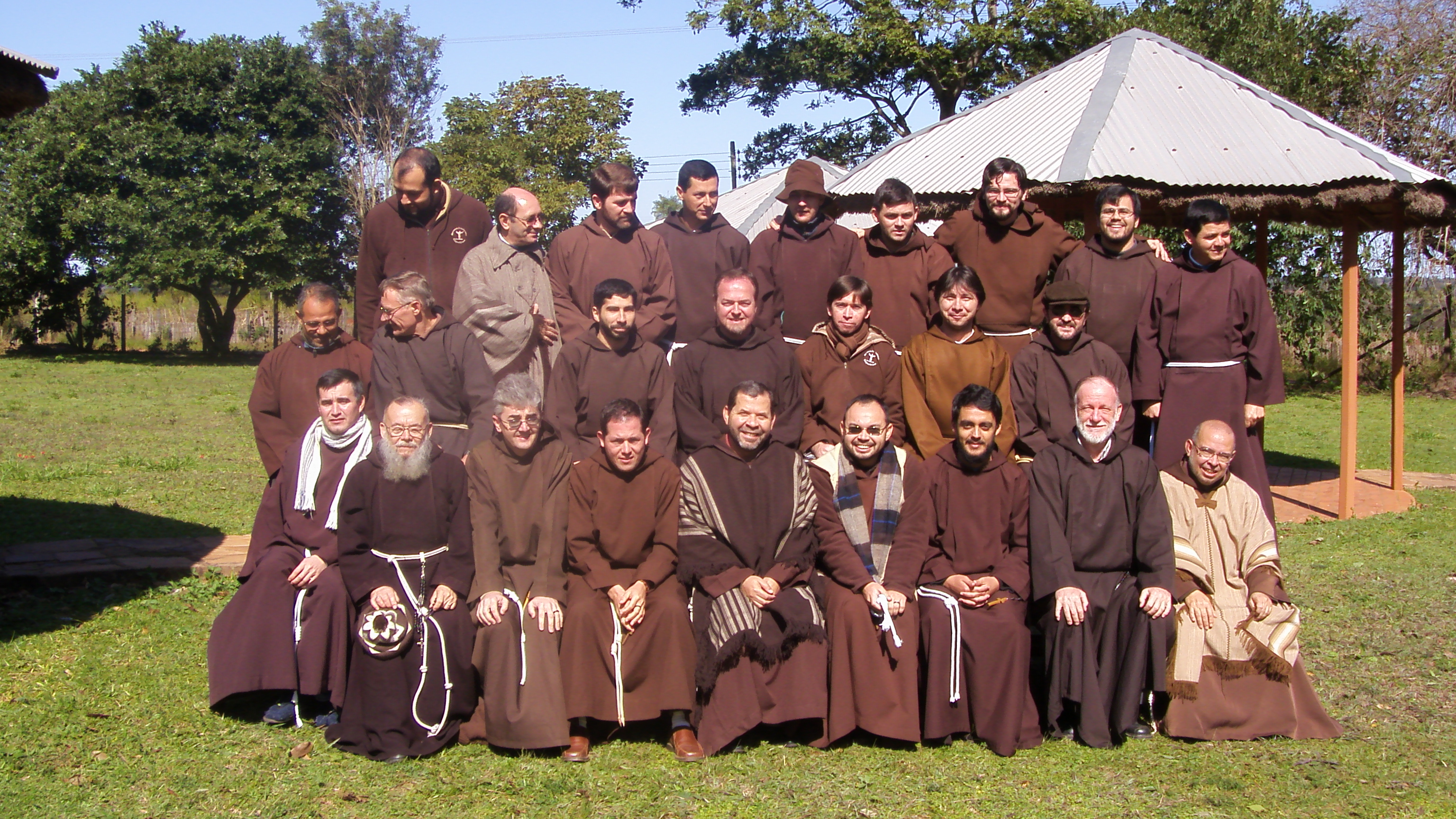 Foto de los hermanos Capuchinos de Paraguay, integrantes de la Custodia San Leopoldo Mandic